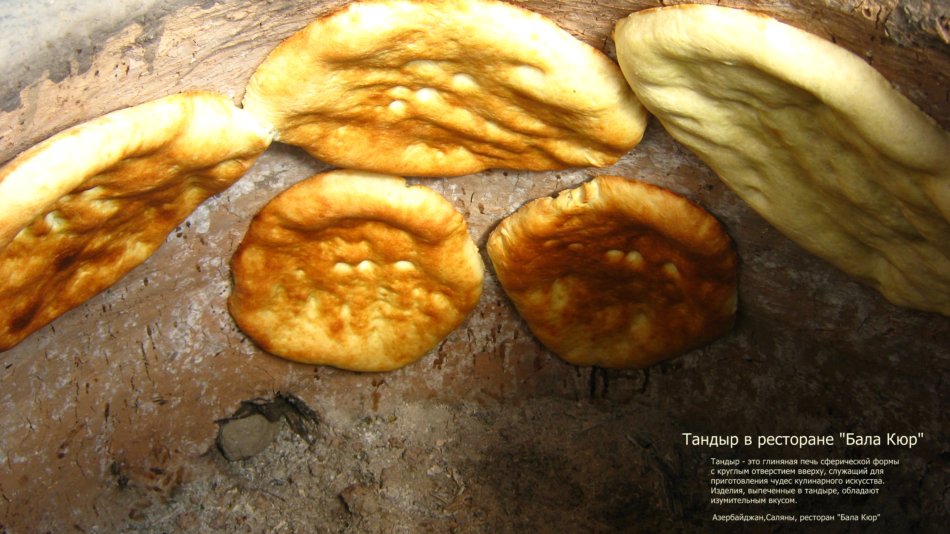 Salyan çörəyi